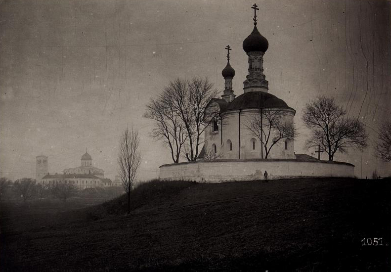 Місто Володимир. Вигляд Василівської ротонди. В далині видніється собор Успіння Пресвятої Богородиці та Єпископський замочок.